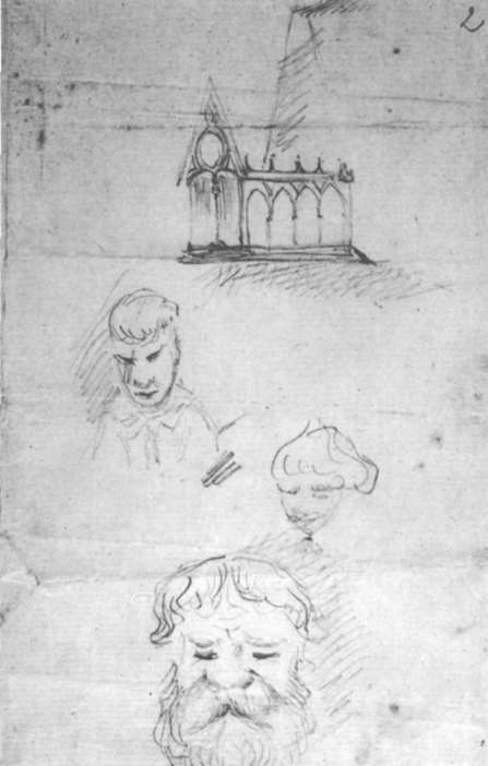 Рисунки и рукописный текст Ф.М. Достоевского/ "Братья Карамазовы". Странничек, Алёша Карамазов